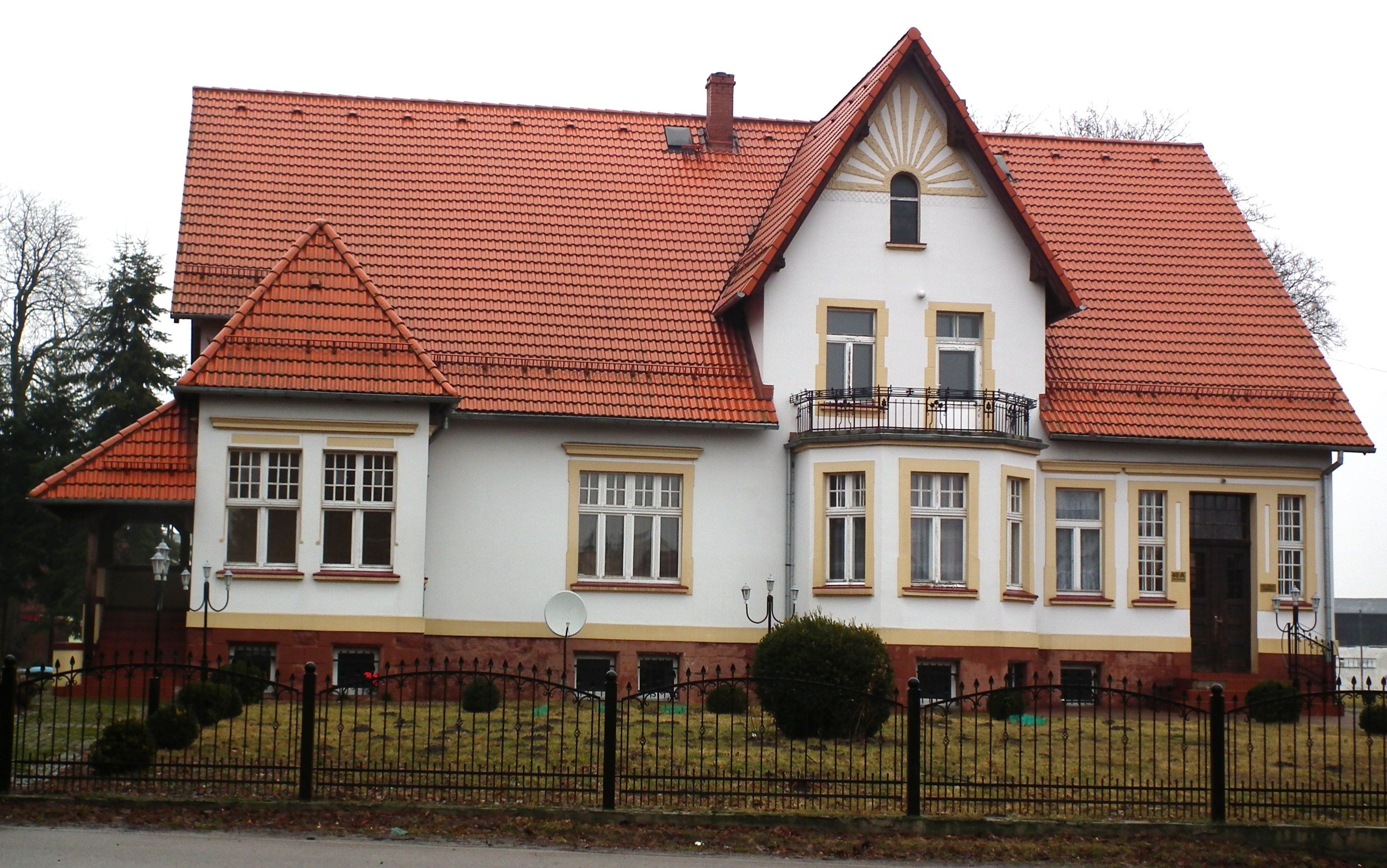 Dwór w Sławianowie.